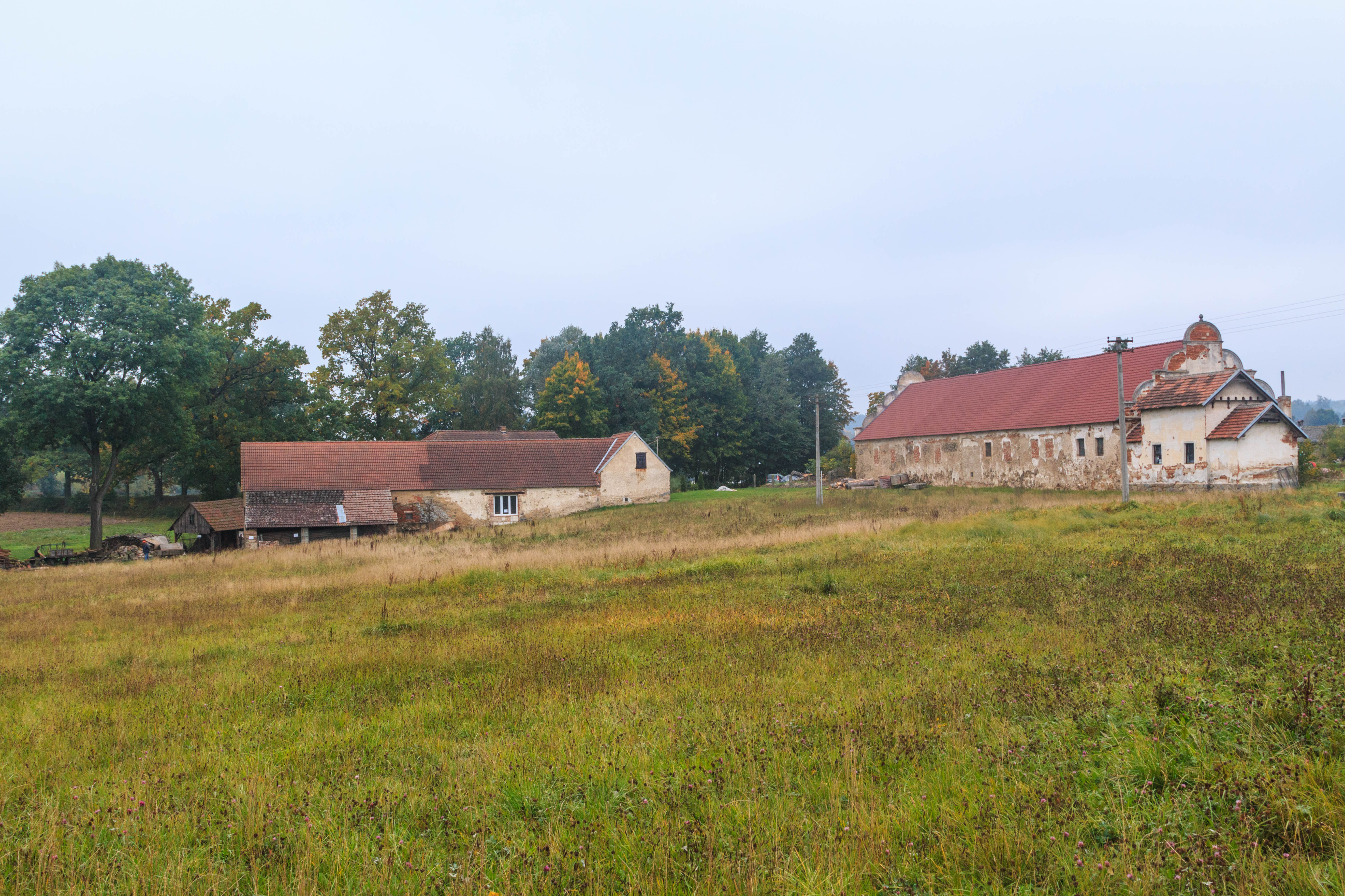 Samota Ovčín u Čekanic - č. 32